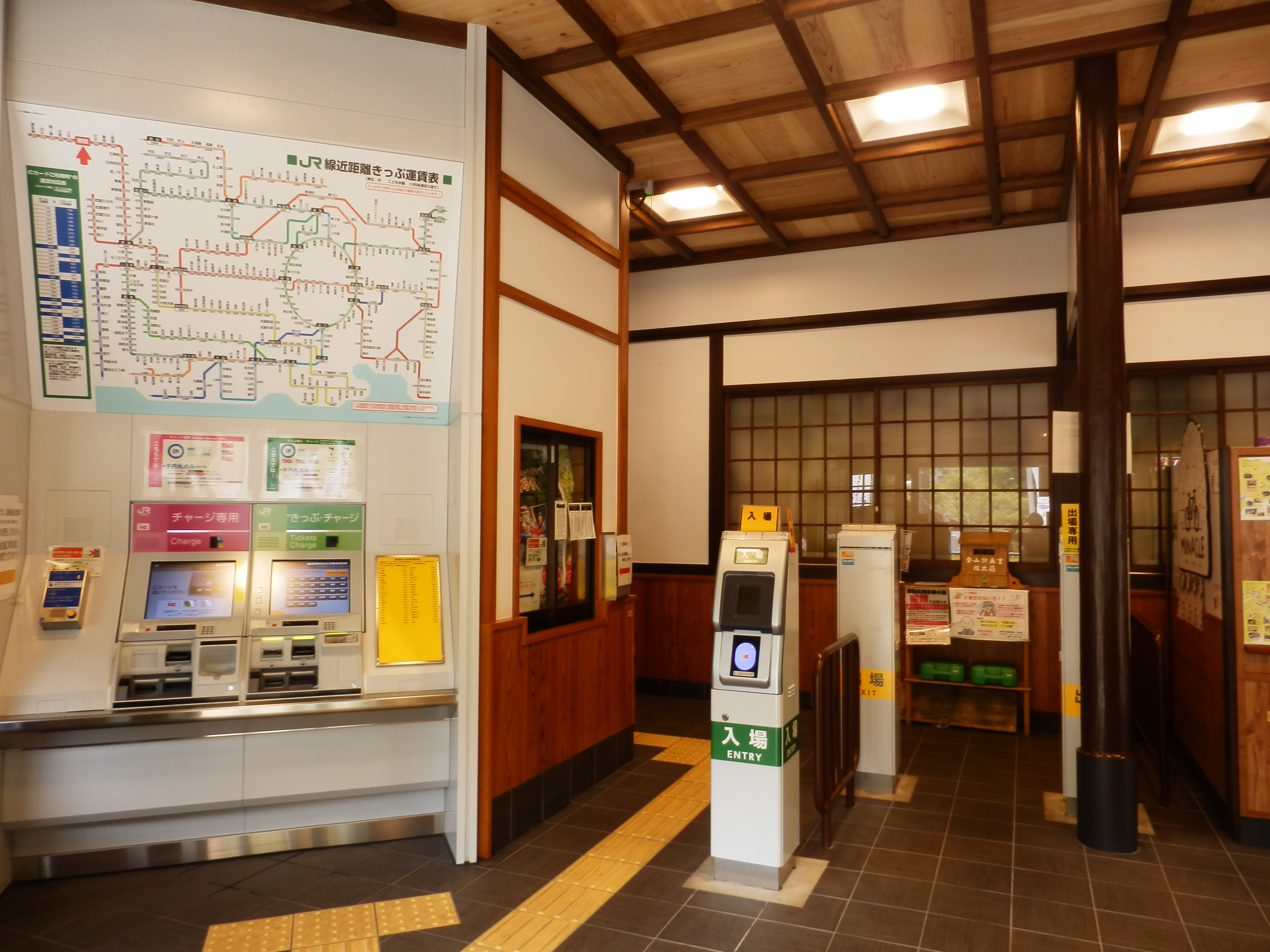 御嶽駅改札